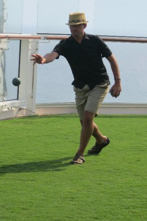 Sur herbejo, esperantisto ludas boĉon.